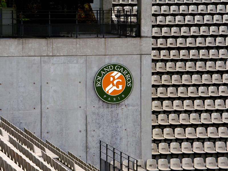 2008 Paryż